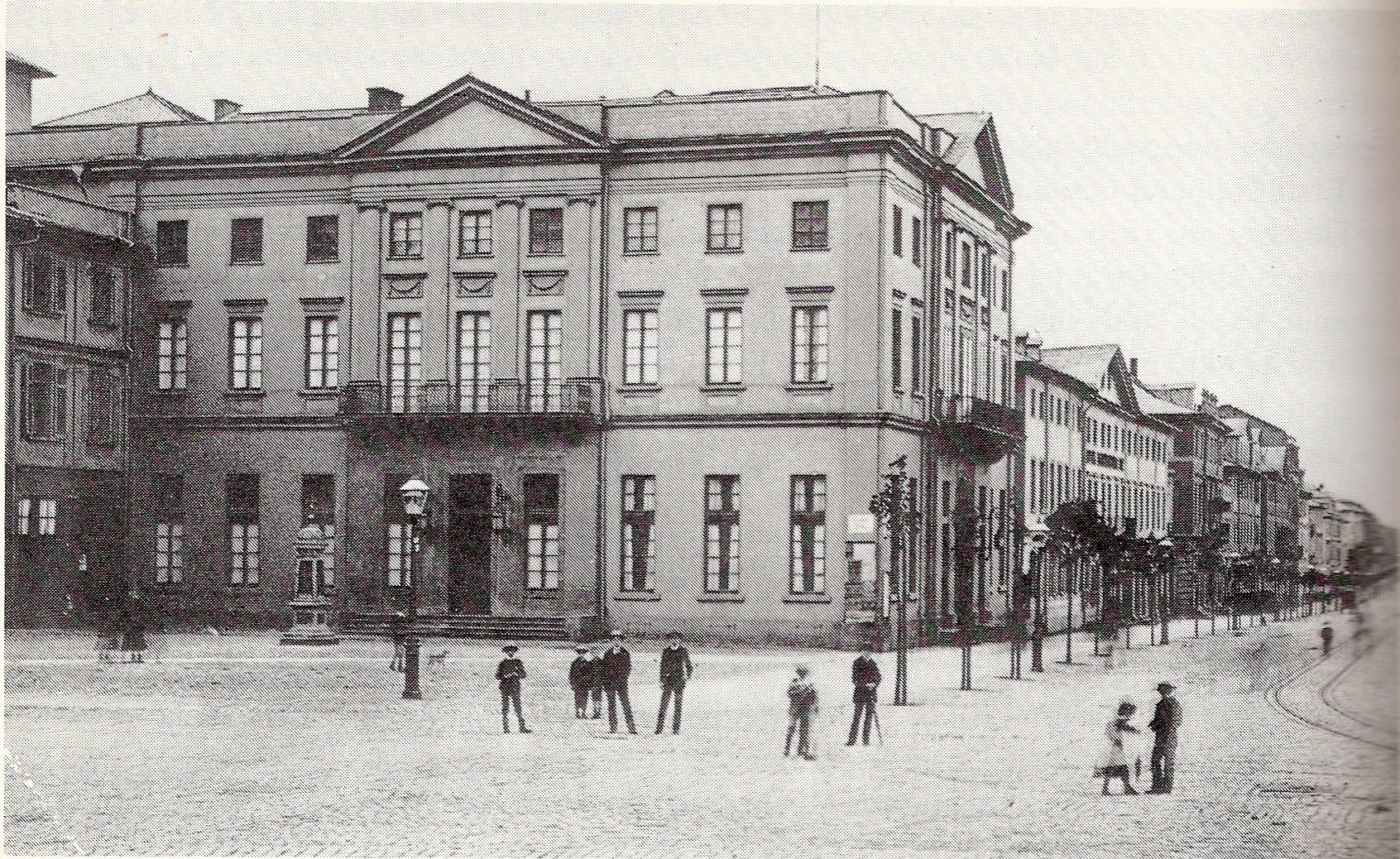 Das Ständehaus (Sitz des hessischen Landtags) in Darmstadt am Luisenplatz im Jahr 1888. Der Sitz der Landstände des Großherzogtums Hessen war im Ständehaus am Luisenplatz in Darmstadt. An diesem Platz befanden sich außerdem die Residenz des Großherzogs (Altes Palais, heute steht dort das Luisencenter) und der Regierungssitz (Kollegiengebäude, heute Sitz des Regierungspräsidiums Darmstadt). Das Ständehaus wurde 1836 bis 1839 erbaut und im Zweiten Weltkrieg wie auch das Alte Palais komplett zerstört. Heute befindet sich an seiner Stelle die Zentrale der Sparkasse Darmstadt.